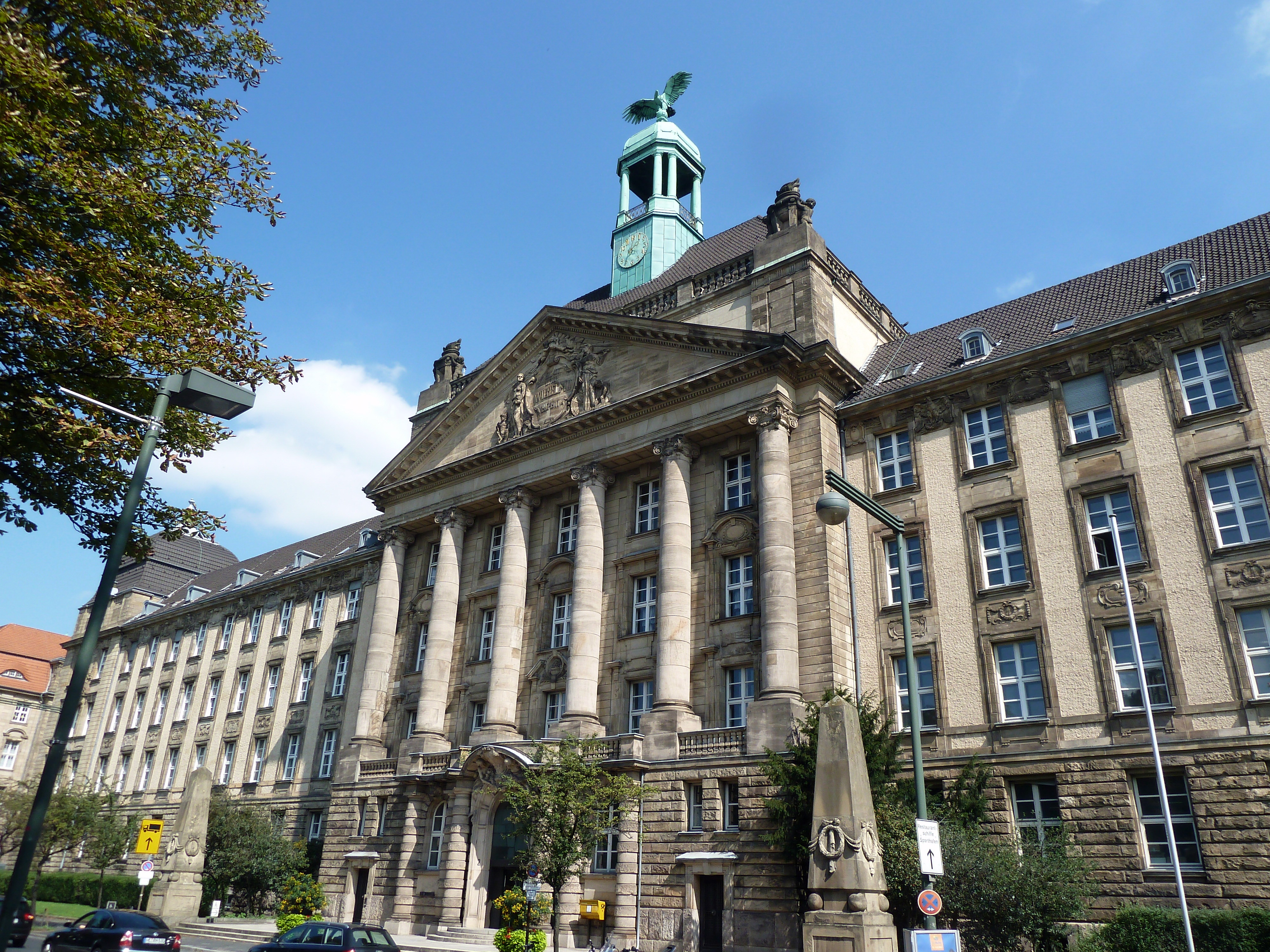 Regierungspräsidium